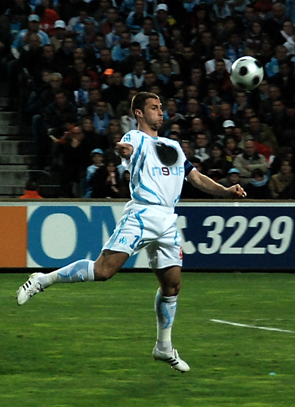 Olympique de Marseille - Association de la Jeunesse auxerroise Lorik Cana saison 2007-2008 1 ere division France